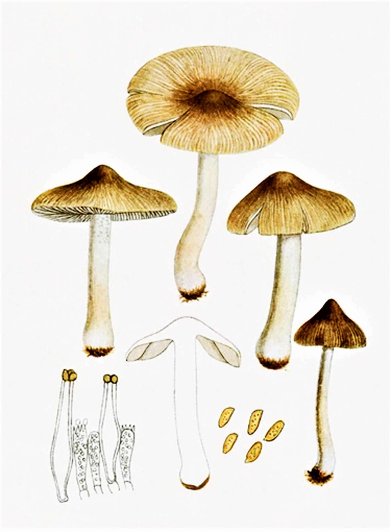 Giacomo Bresadola: Inocybe rimosa (Bull.) P.Kumm (1871) sin. Inocybe fastigiata (Schaeff.) Quél. (1872)